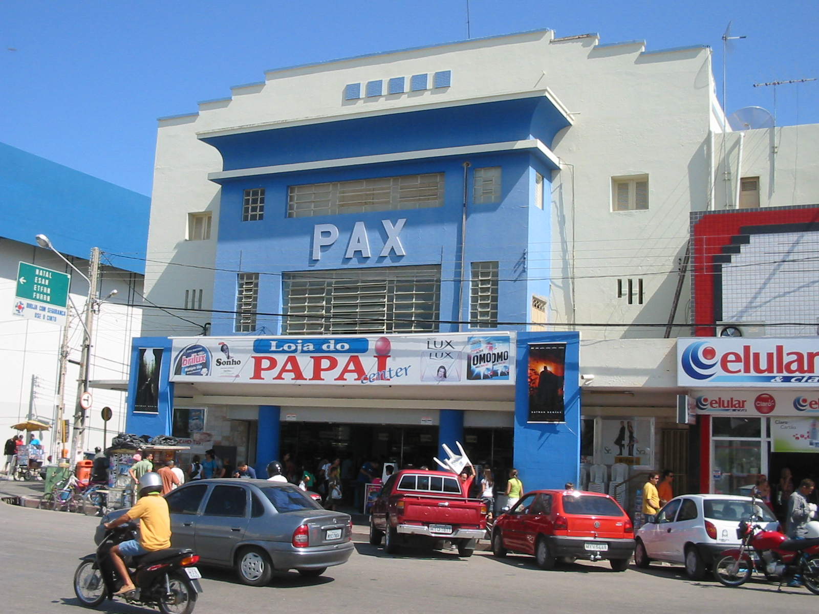 Mossoró (Rio Grande do Norte), Brasil. Cine Pax. Pax Movie Theater. Mossoró (Rio Grande do Norte), Brazil.